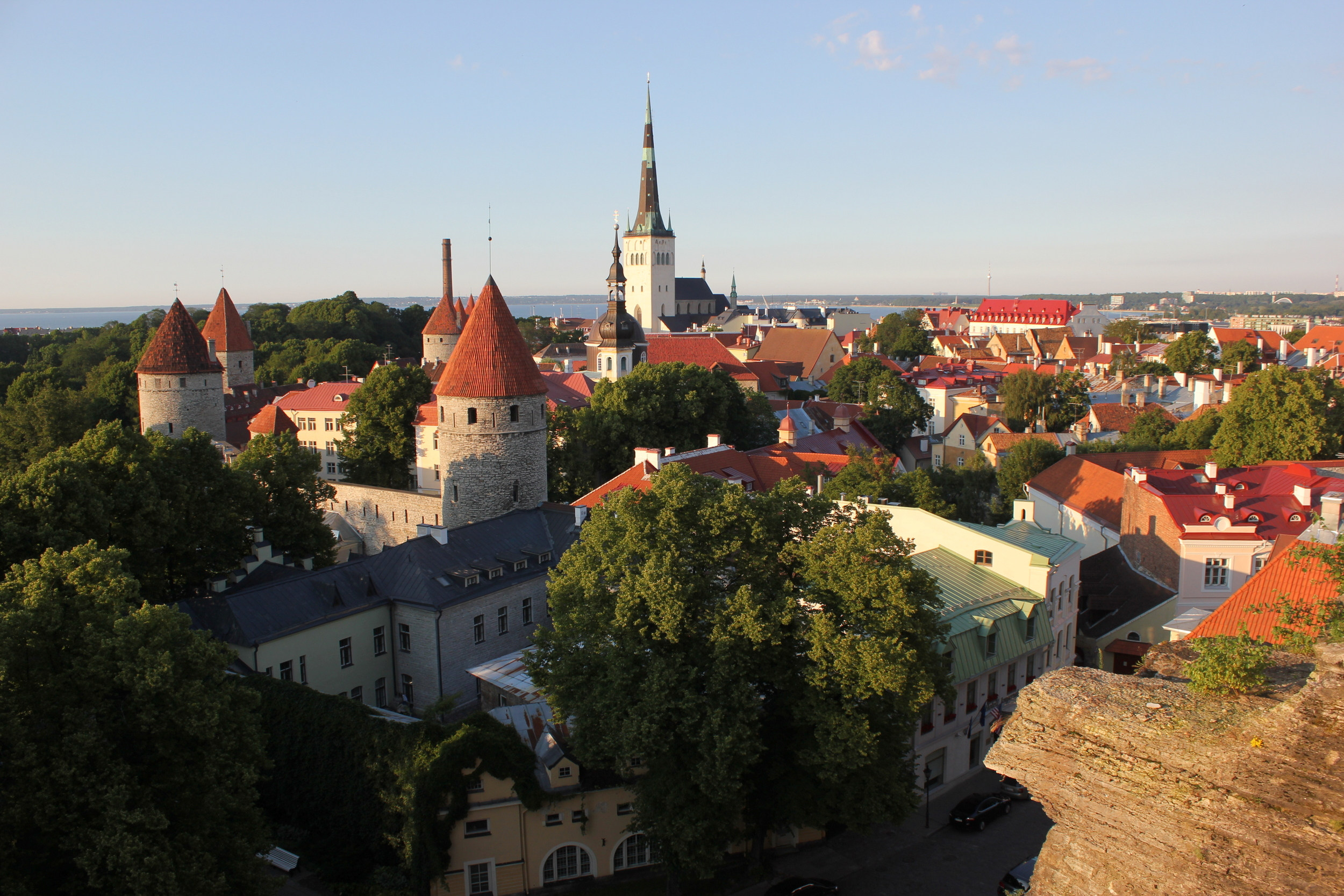 Blick vom Domberg auf die Altstadt von Tallinn.